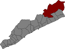 Localització de Tordera al Maresme